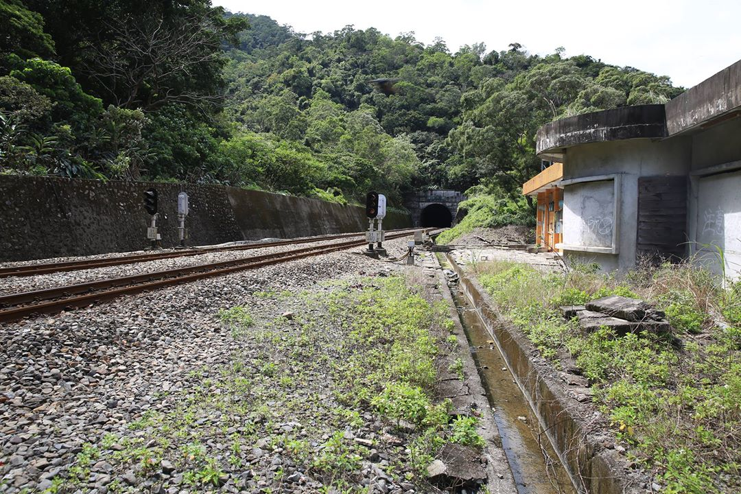 菩安號誌站站內